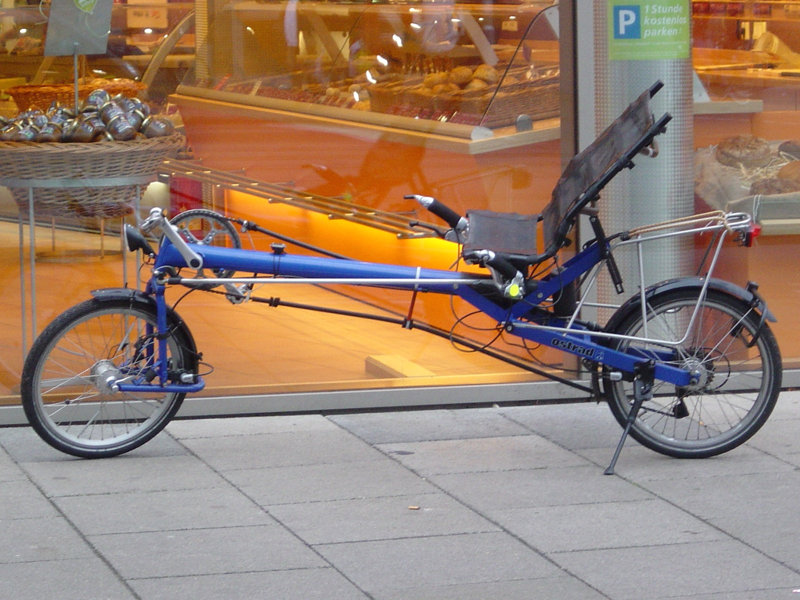 Blaues Liegerad der Marke Ostrad Adagio